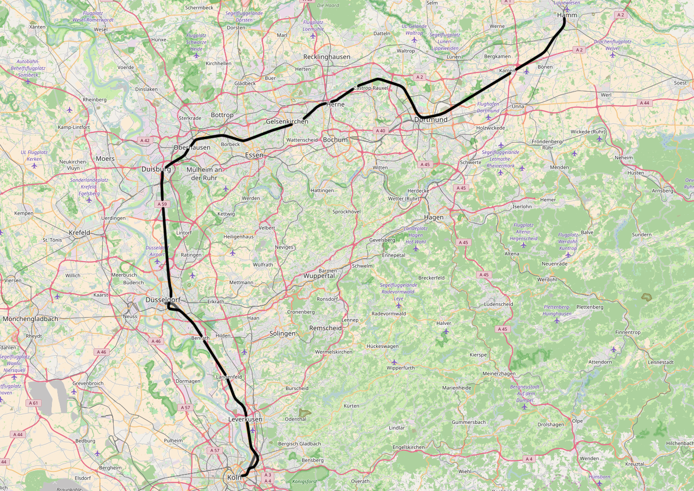 DB 2650, Cologne - Hamm